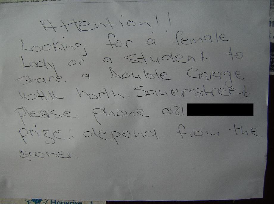 Wohnungsanzeige auf Namlish.